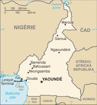 Mapa Kamerunu - přeložená mapa z CIA World Factbook.